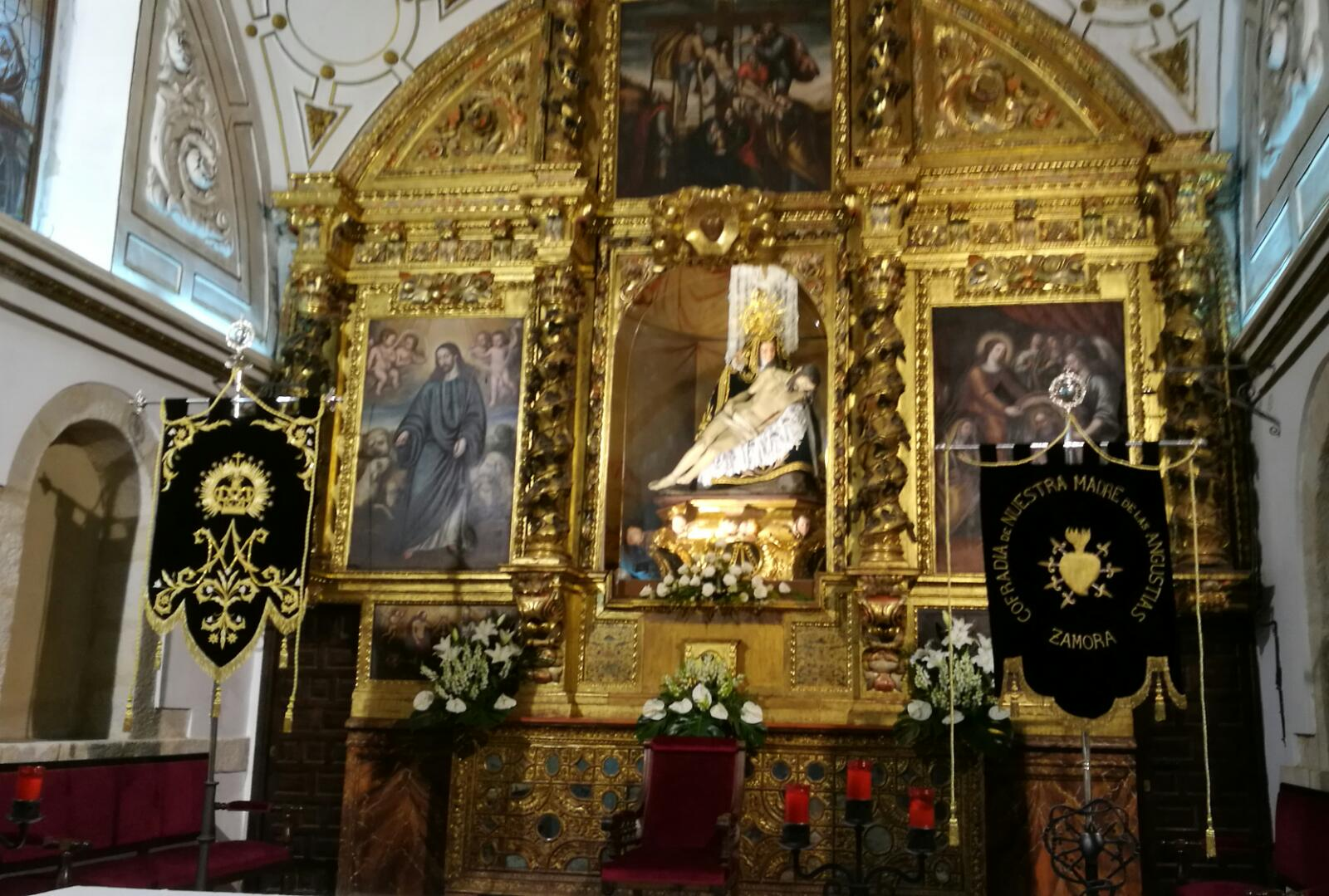 Capilla dentro de la Iglesia de San Vicente Martir de Zamora